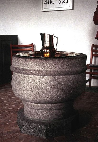 Resen Kirke, (Skive Kommune), døbefont